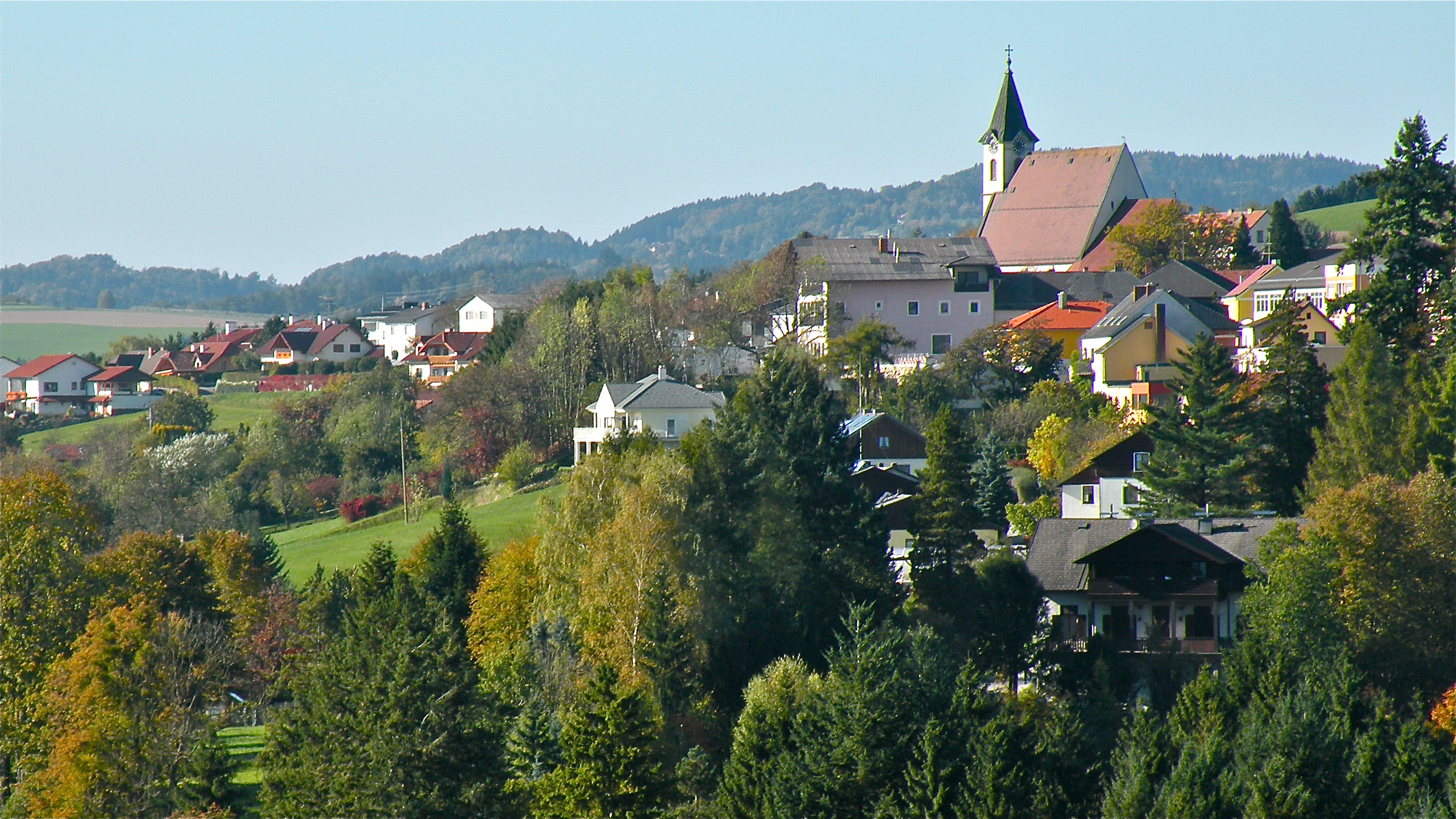 Ortsansicht von Bad Kreuzen